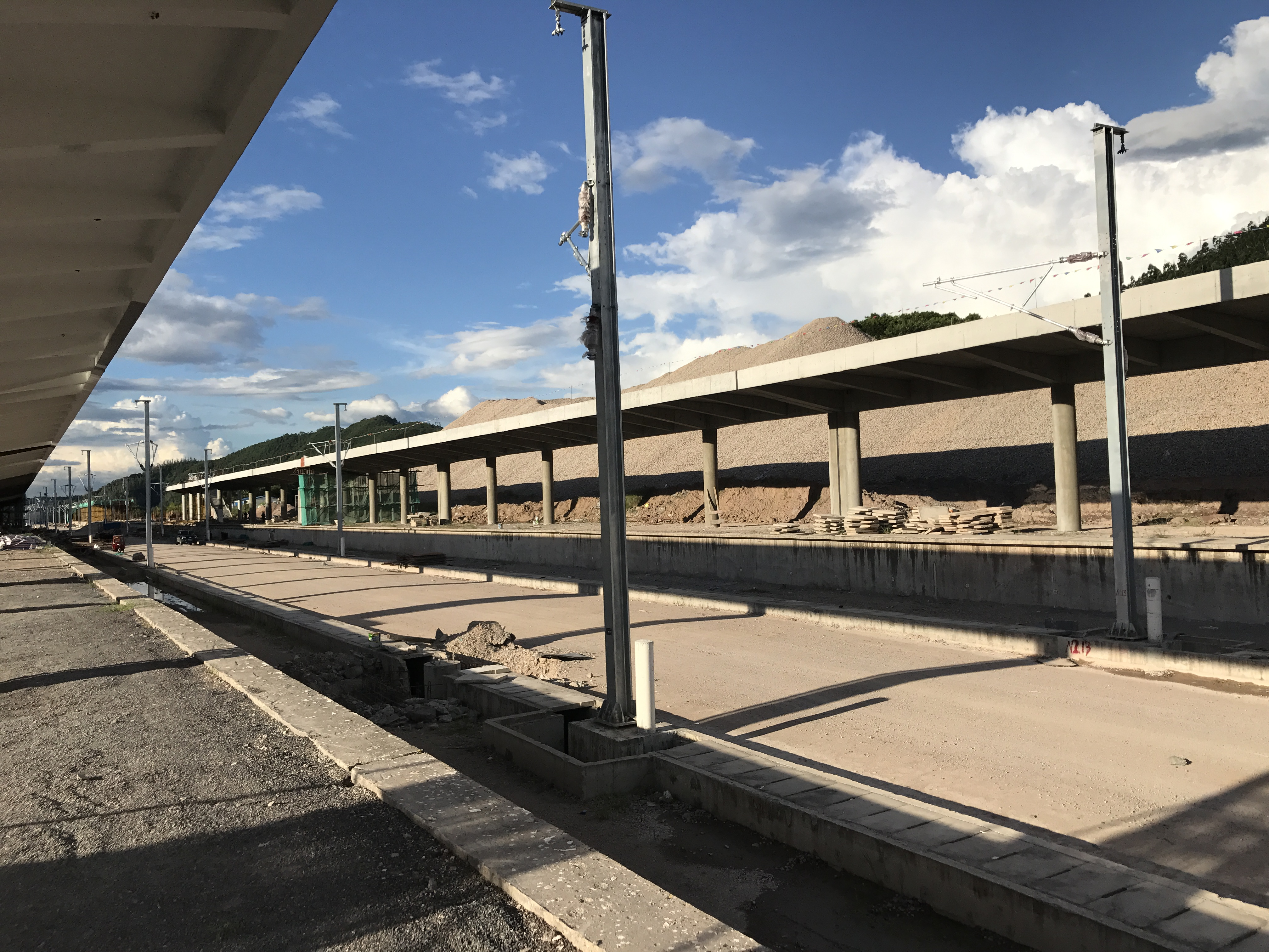 建设中的永安南站，位于南三龙铁路中段